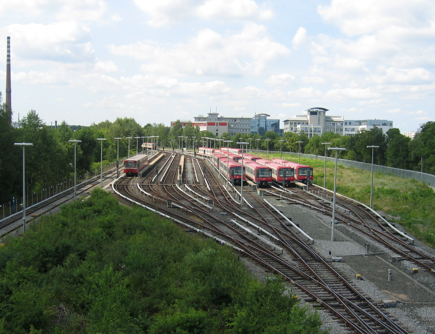 Abstellanlage im Betriebshof der U-Bahn Nürnberg, Blick von Osten